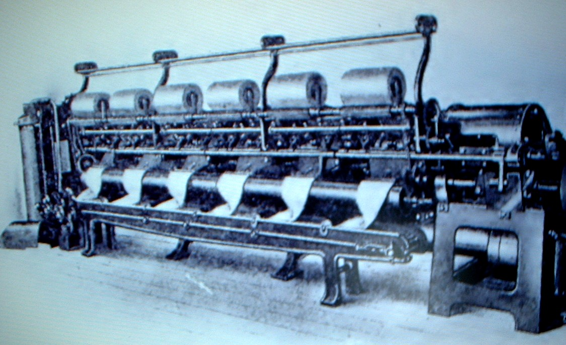 Baumwollkämmaschine Baujahr ca. 1910